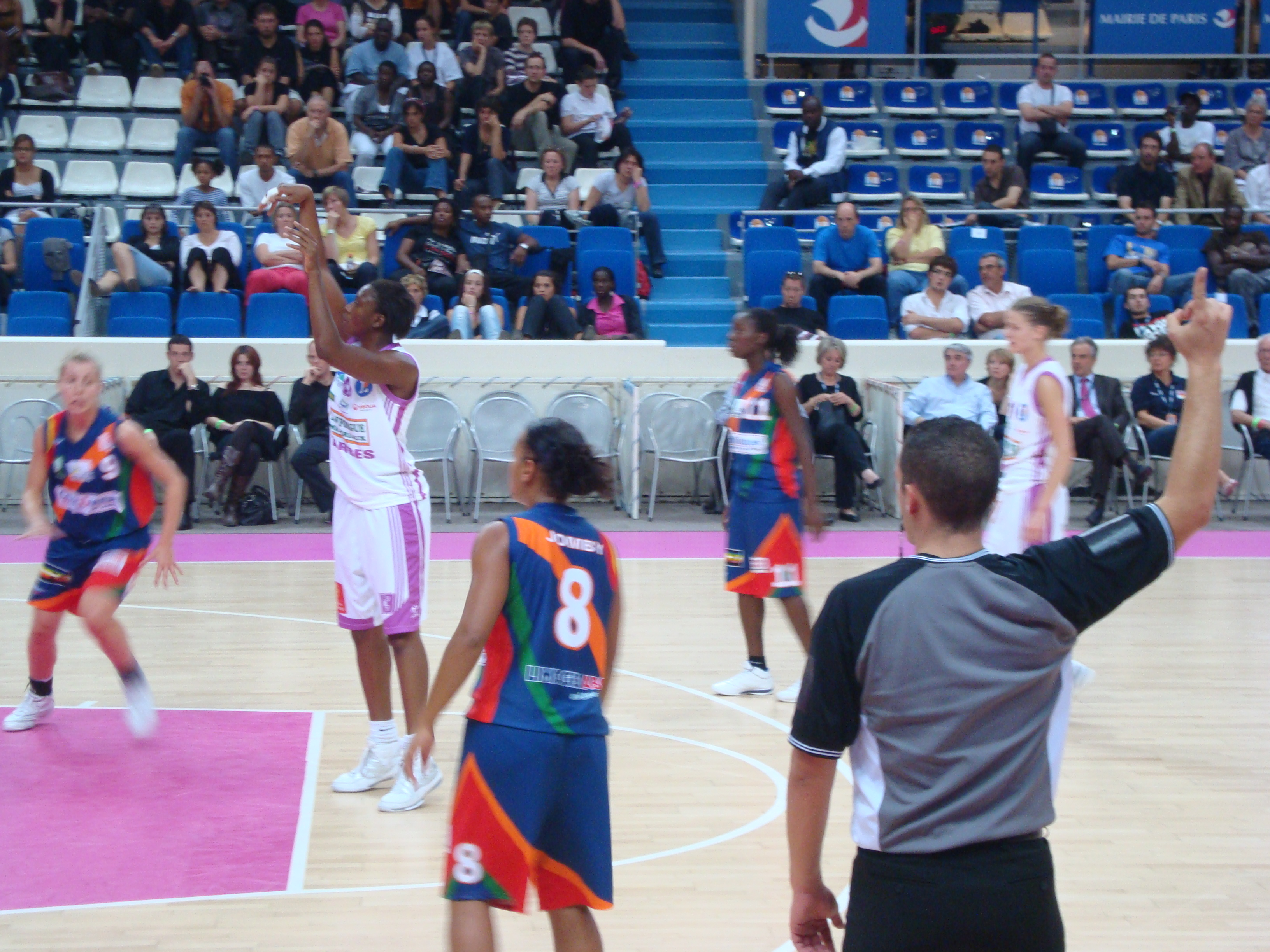 Dernier lancer franc pour Fatimatou Sacko (Tarbes, 13)